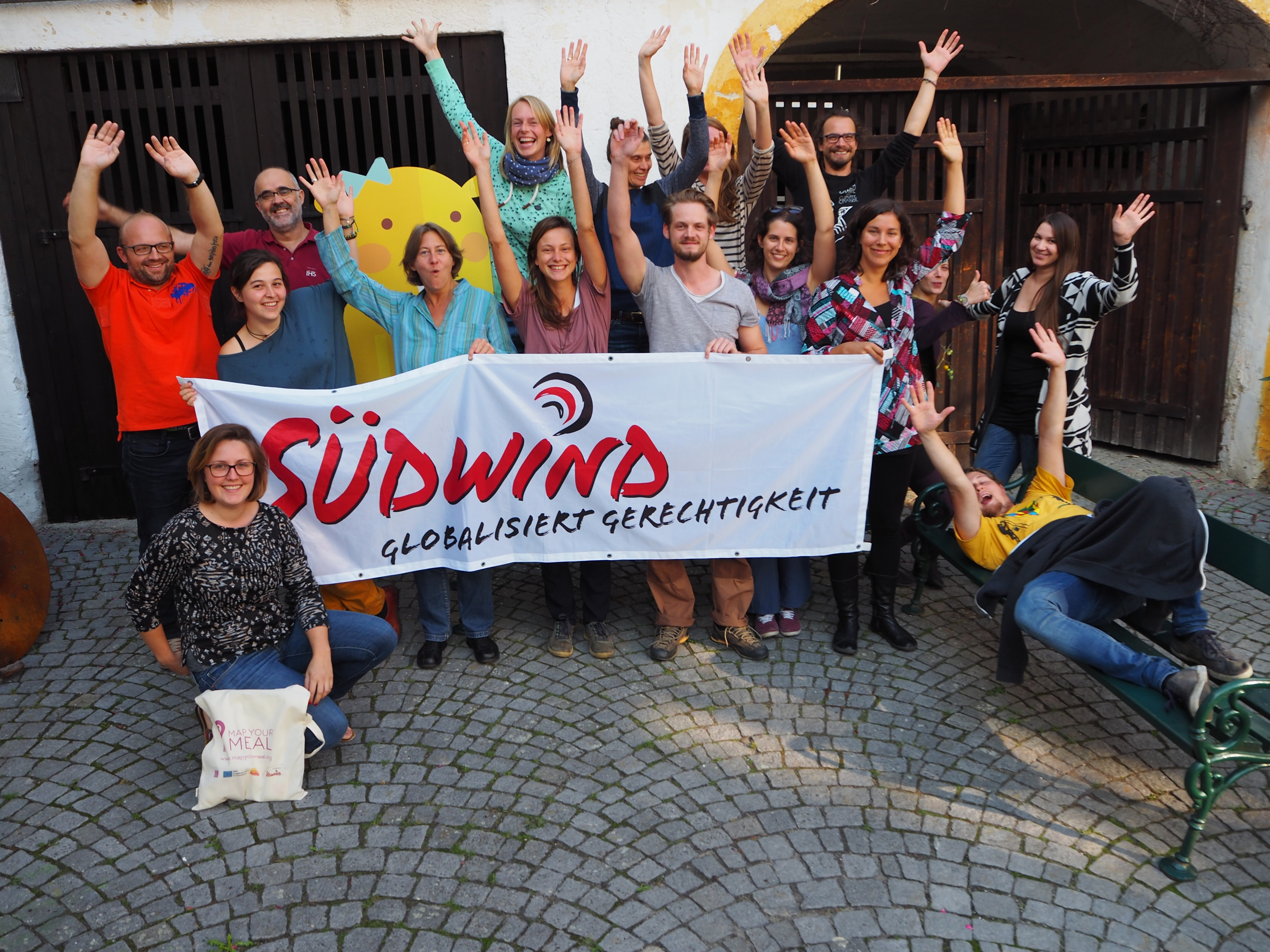 AktivistInnen mit Südwindtransparent